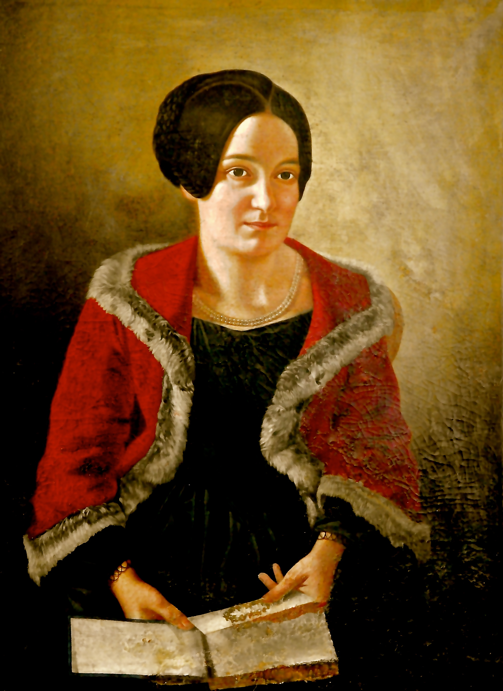 Honorata Zapová (rozená z Wiśniowských, 1825-1856), česká vlastenka a spisovatelka.